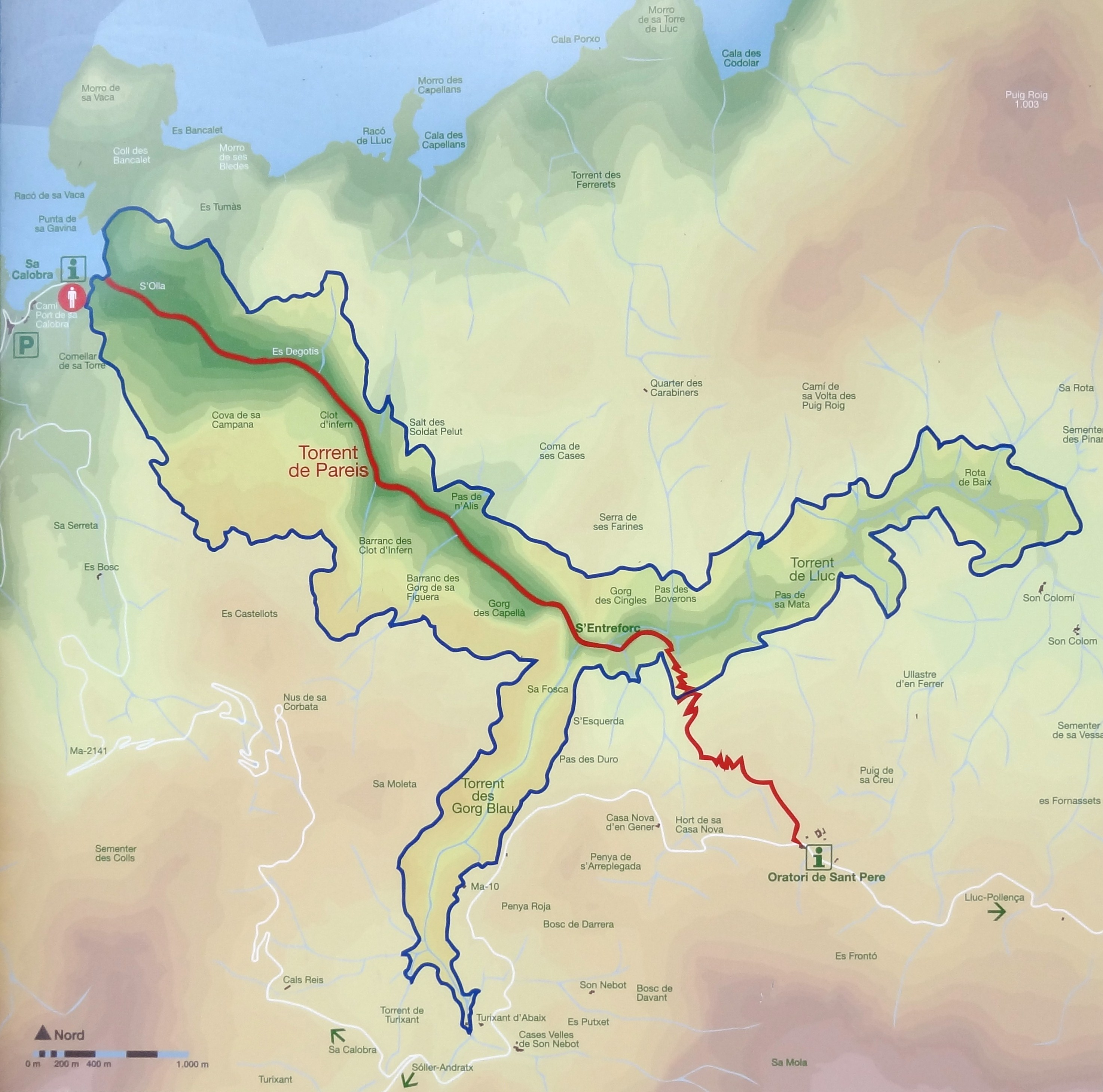 Karte auf dem Hinweisschild zum Torrent de Pareis an der Cala de sa Calobra, Gemeinde Escorca, Mallorca, Spanien